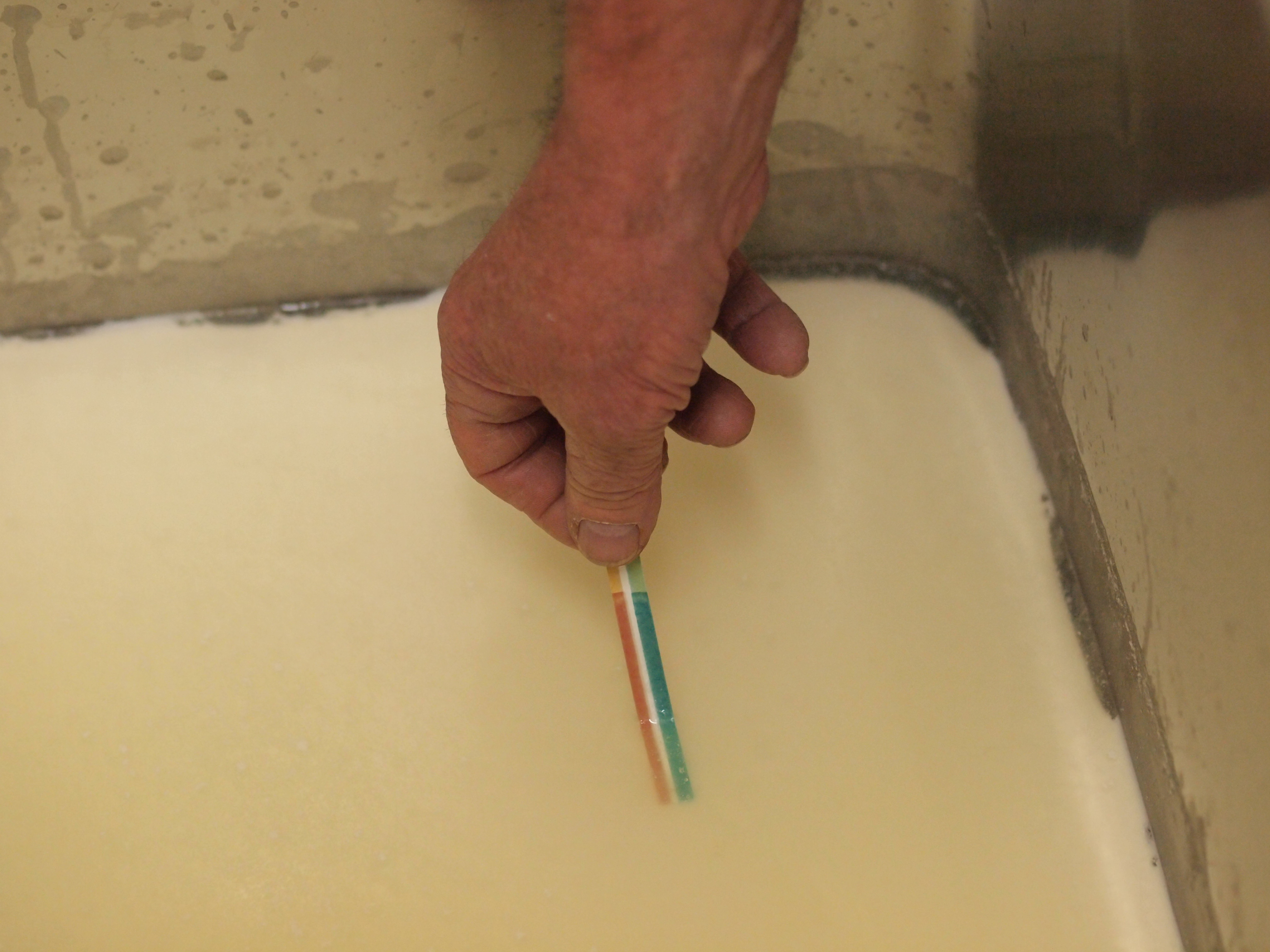 Mesure de pH du lait de chèvre caillé dans la fromagerie du Menez-Hom, en Bretagne.